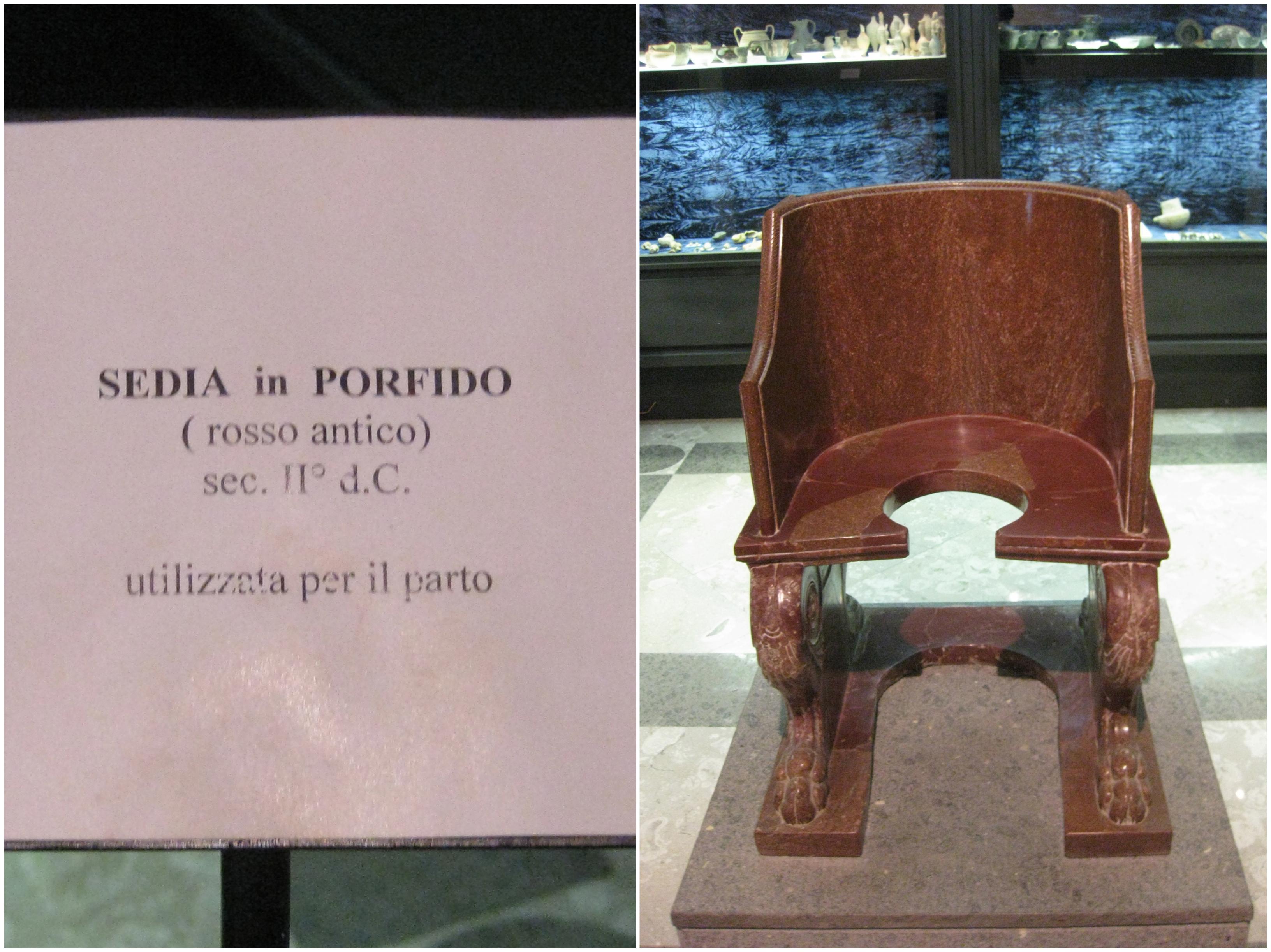 Sedia in porfido del sec. II d.C., utilizzata per il parto. Museo di Monte Cassino.